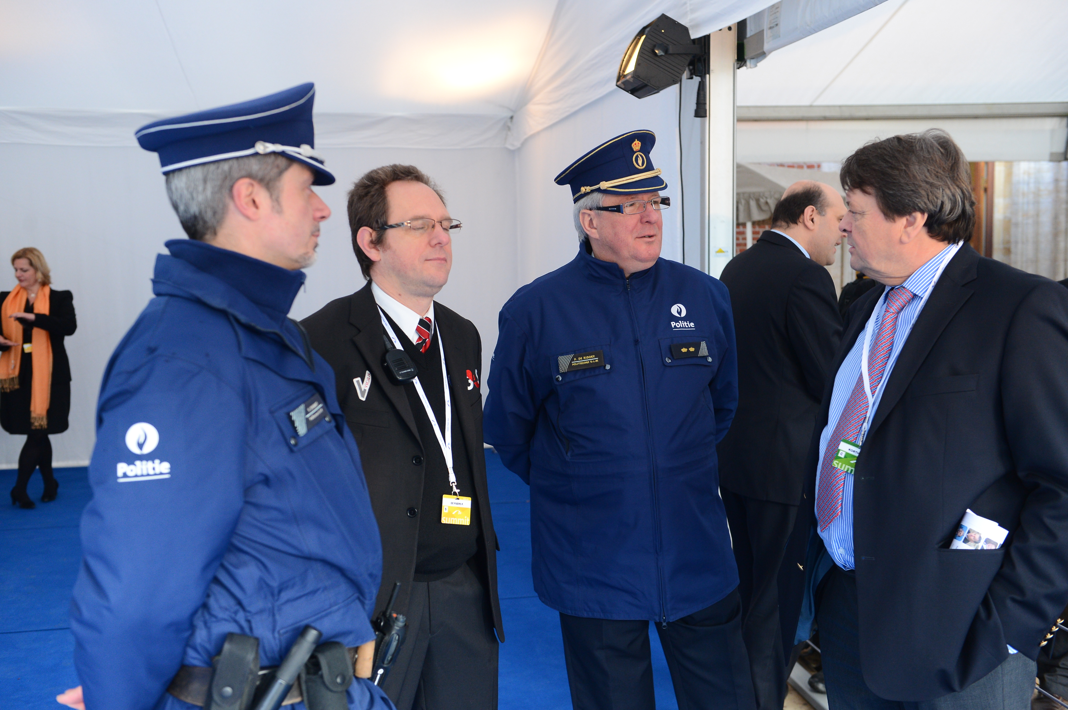 EPP Summit; Meise, 19 Dec. 2013